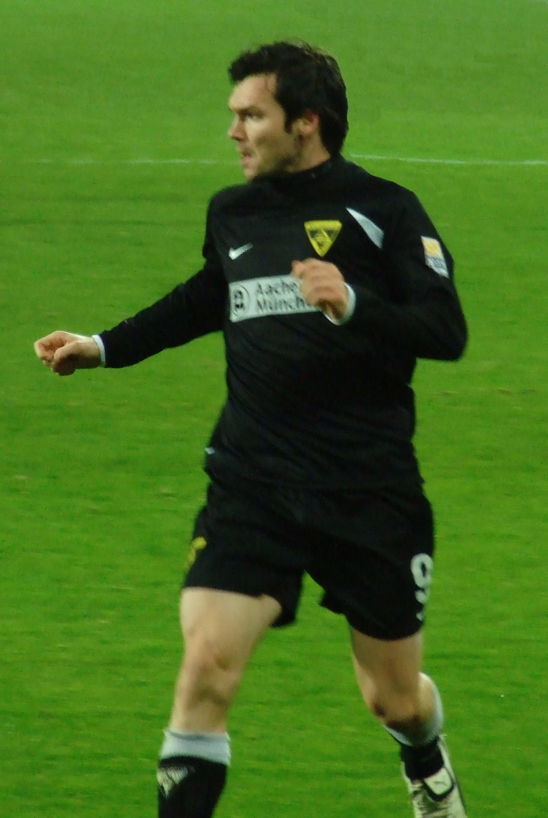 Benjamin Auer beim Fußballspiel Alemannia Aachen - Karlsruher SC